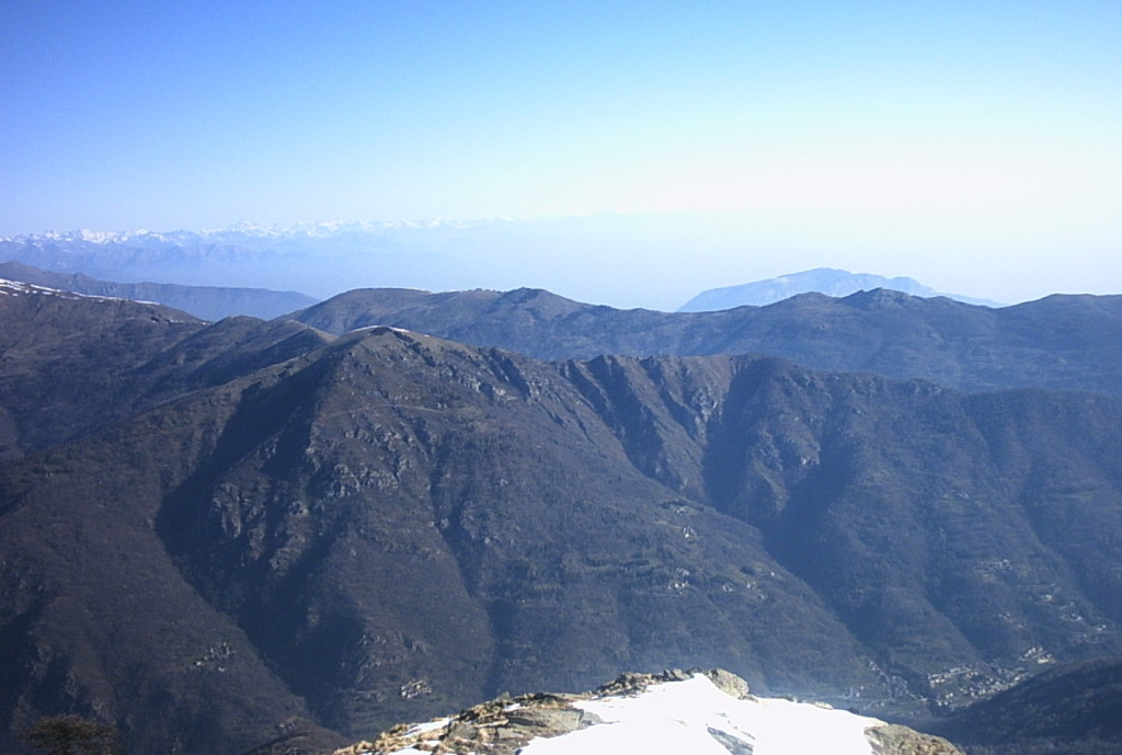 Il monte Ricordone dalla vetta del monte Birrone. In basso a destra, nel fondovalle, l'abitato di Frassino